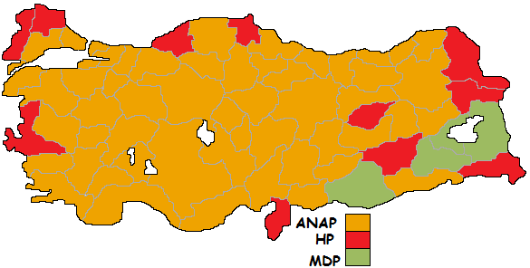 1983 genel seçimleri sonuçlarının Türkiye haritasında gösterimi.